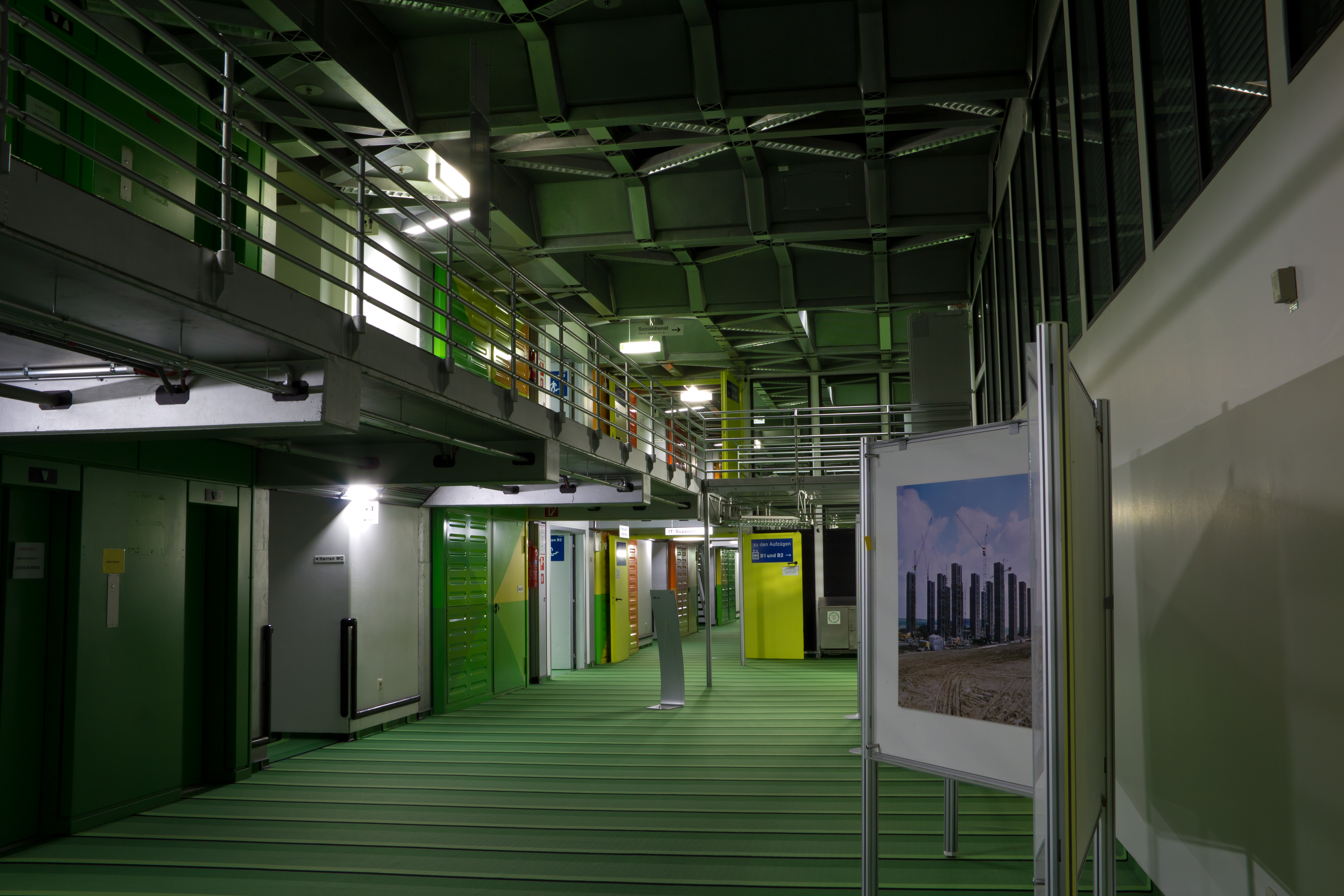 Ansicht des Innenbereichs des Universitätsklinikums Aachen, auf der Höhe des Aufzuges B2 - B2 steht hierbei für den dritten Aufzug des B Ganges. Insgesamt gibt es für jeden Gang mit Buchstabennennung immer sechs Aufzüge.